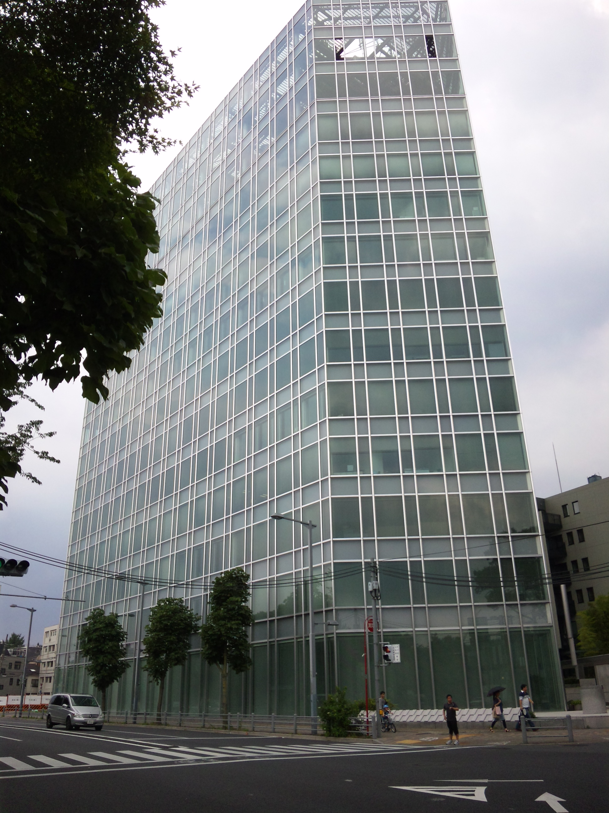 千駄ヶ谷インテス